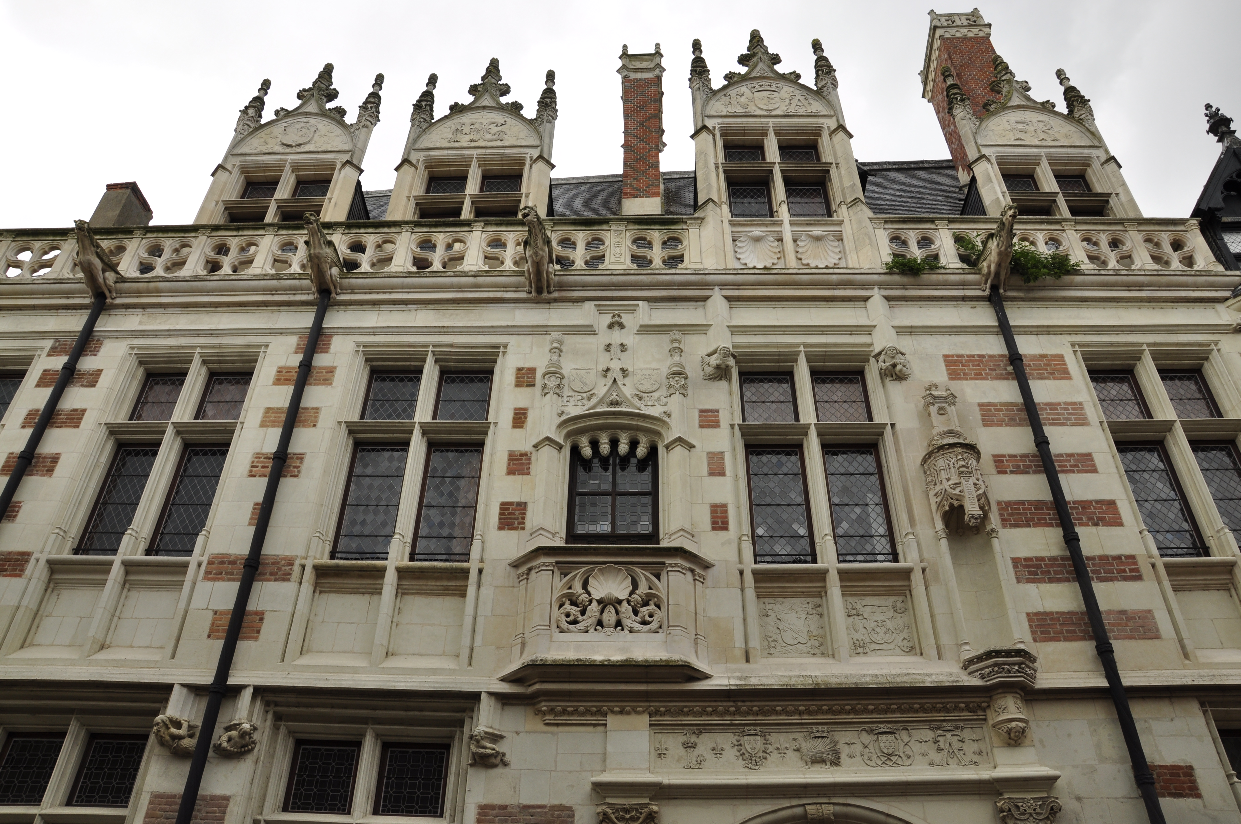 Hôtel d'Alluye vue de la façade, Blois (41) .